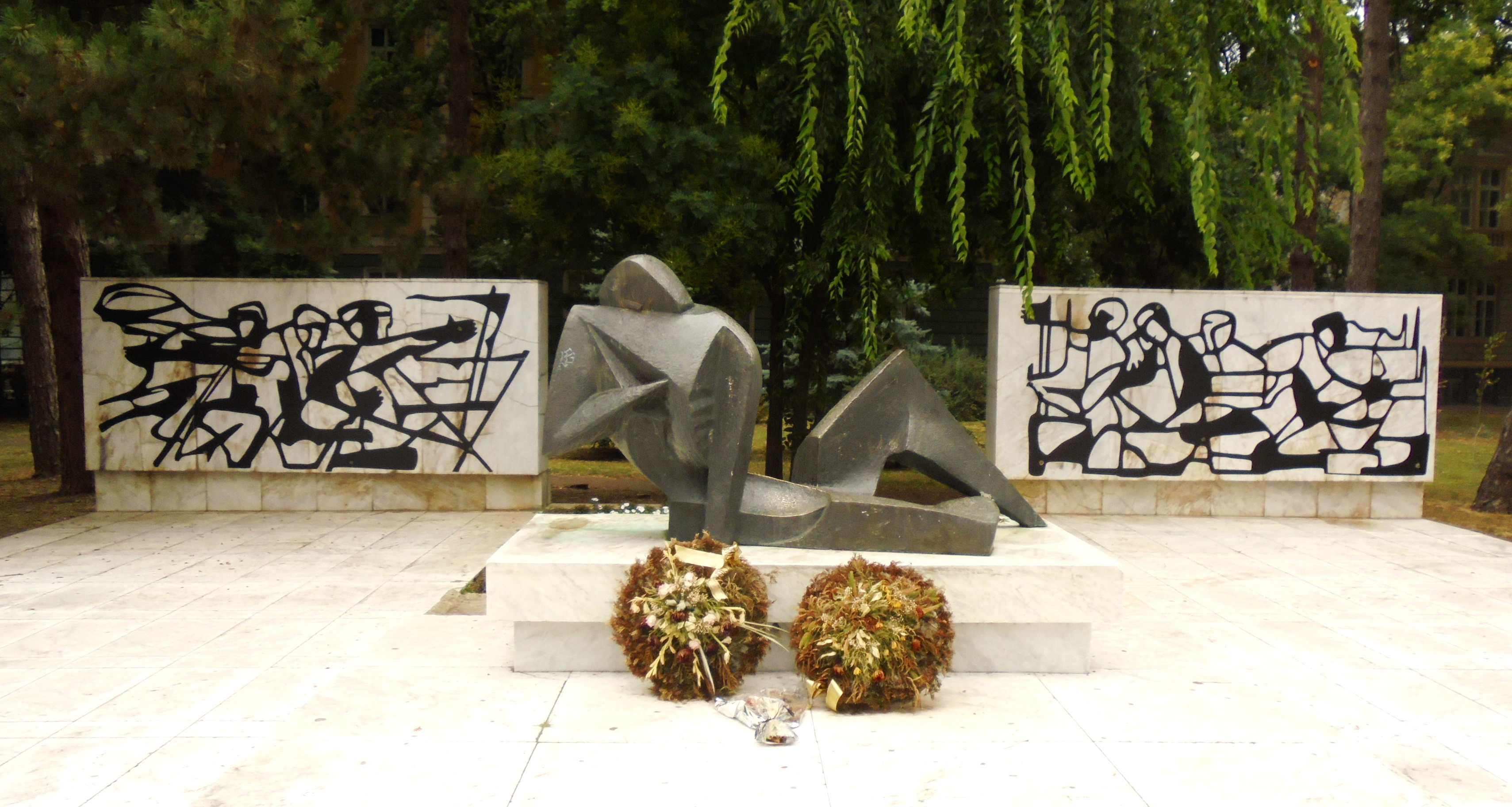 Srpski (latinica): Spomenik borcima NOR-a, rad Aleksandra Zarina, podignut 1961. godine, nalazi se u centru Kikinde. Delovi spomenika su vandalizovani, te je preko mermernih ploča zalepljena folija sa imitacijom originalnog izgleda spomenika.